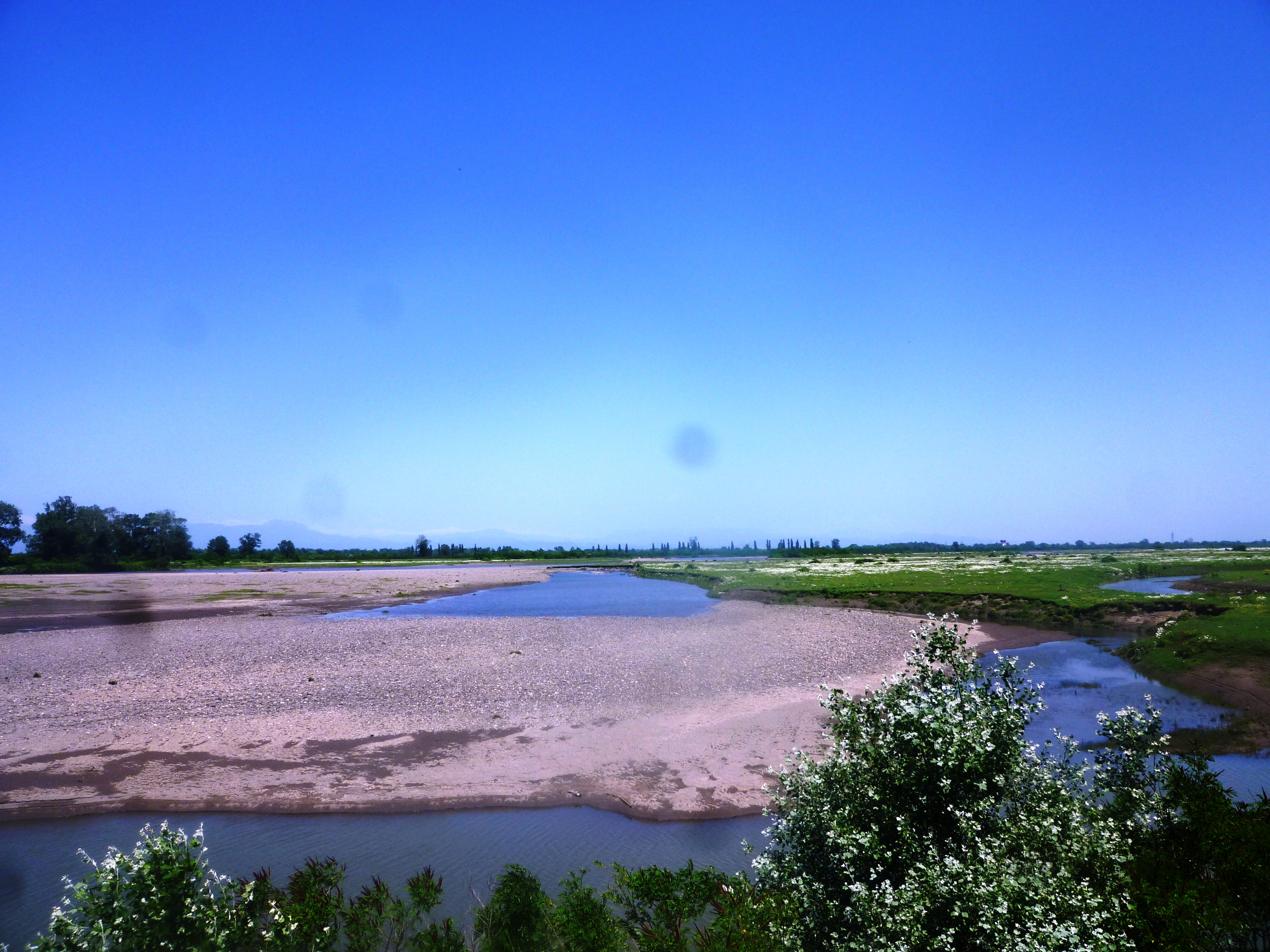 რიონის ხეობა ჭყვიშში, ტაბიძეების სახლ მუზეუმის მახლობლად